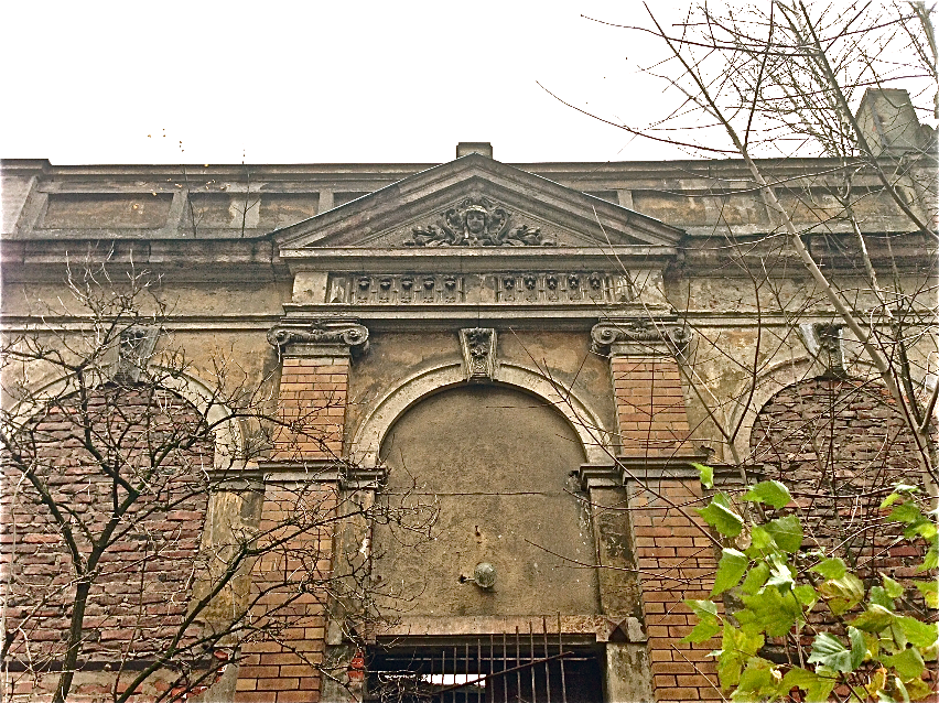 Eingangsportal Barberina (Ballhaus) Chemnitz Standort: Chemnitz- Reichenhain, Erfenschlager Straße 36